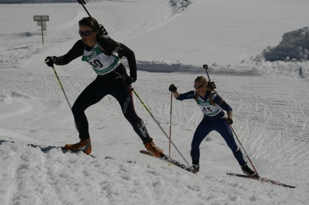 See Title